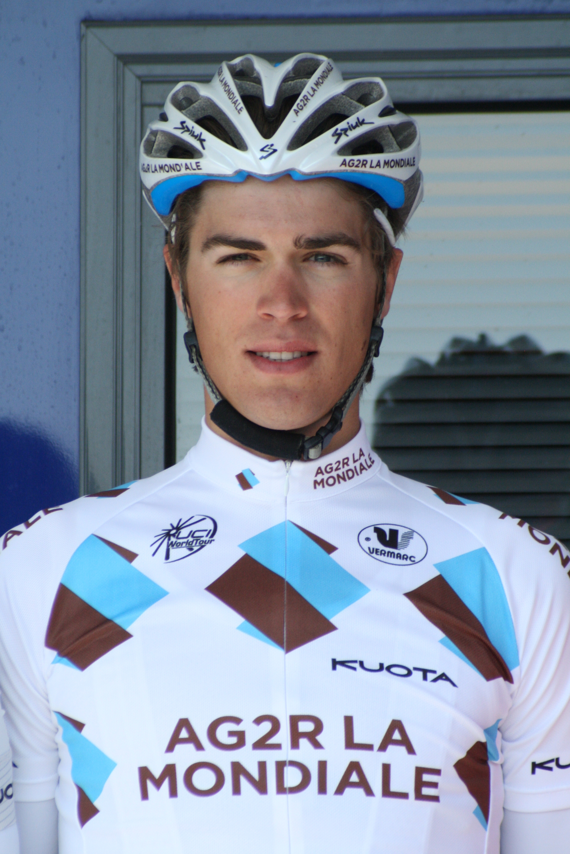 Présentation des coureurs au départ de la première étape Steve Houanard